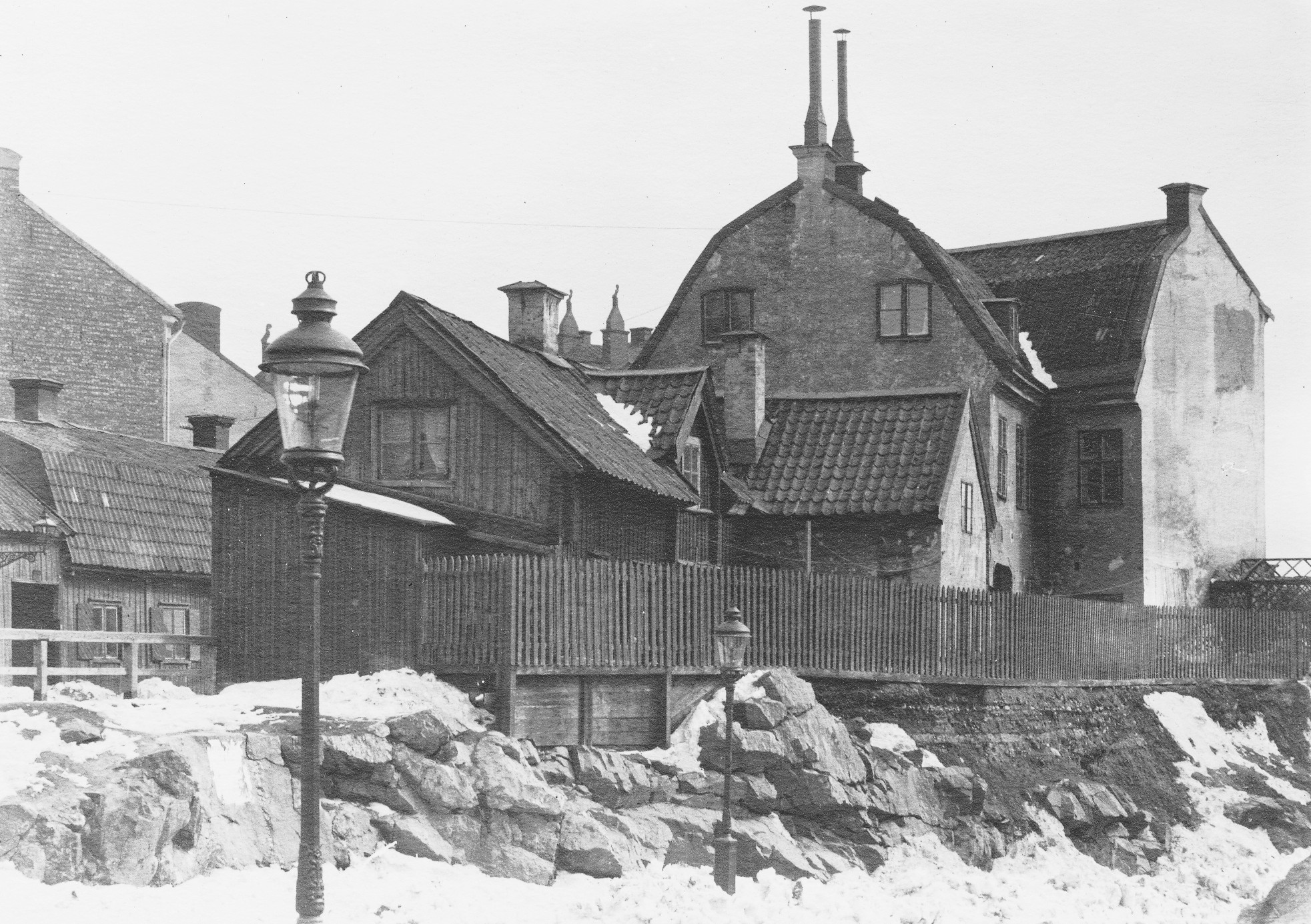 Fastigheten Tapeten 9, nuv. Brännkyrkagatan 111, från Ansgarieparken